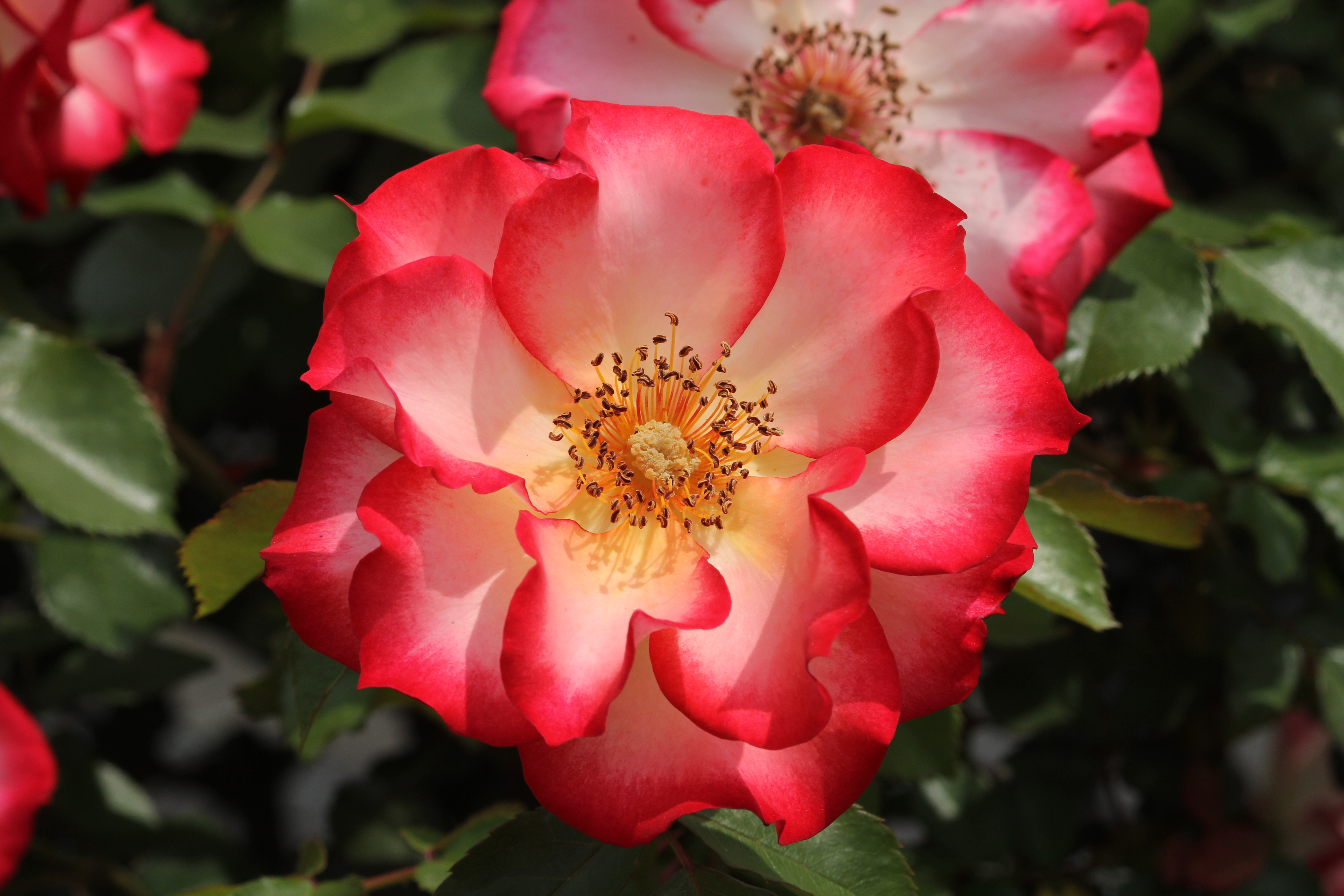 Rosa Betty Boop